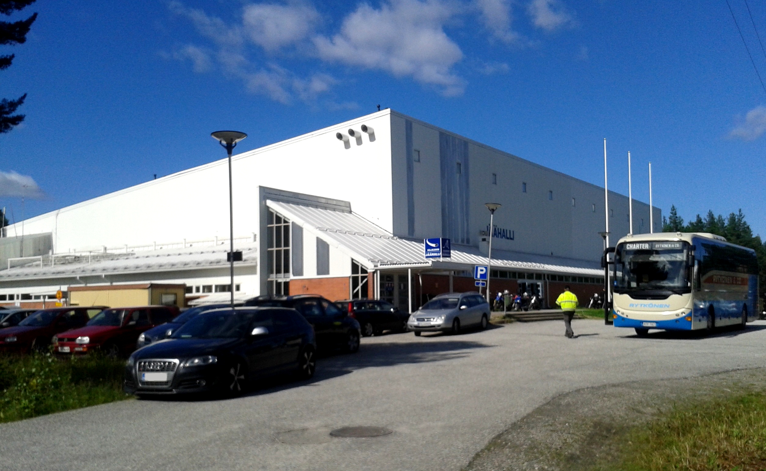 Kajaanin jäähalli kesällä.